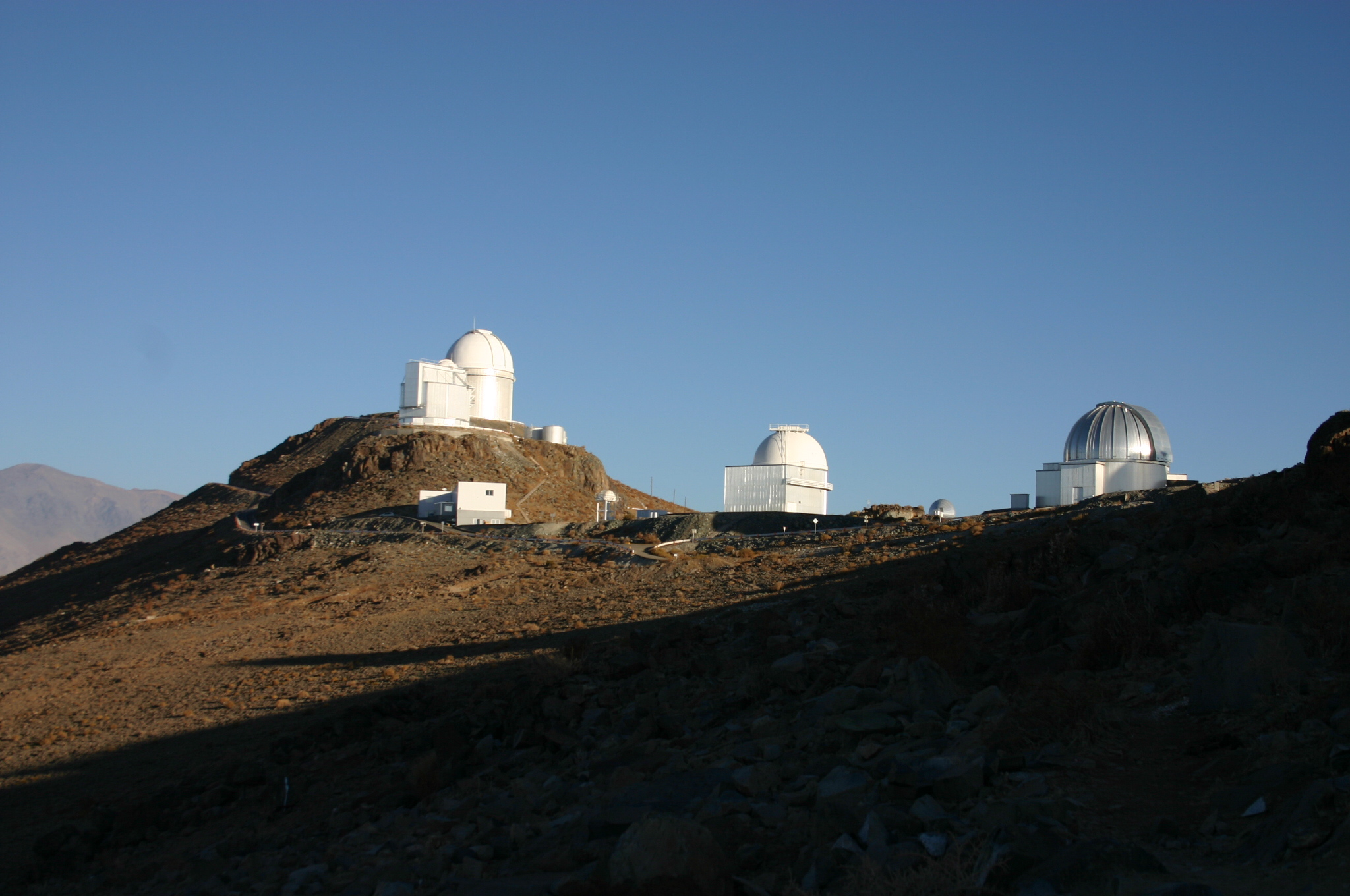 Vue de jour du site de La Silla, au Chili.